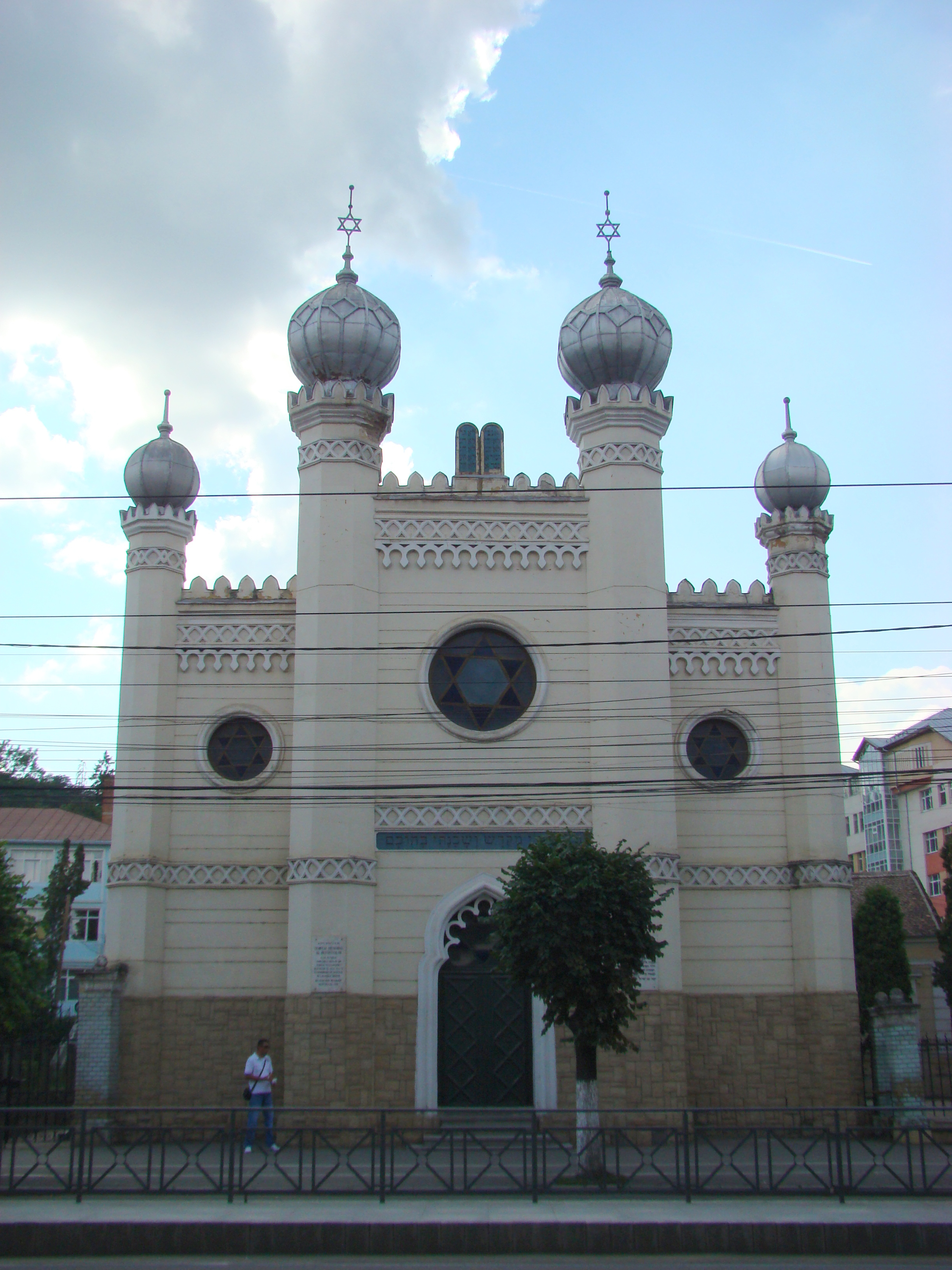 Templul memorial al deportaților evrei